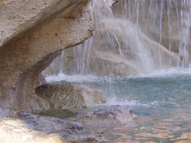 Bisogna seguire il rumore dell'acqua...